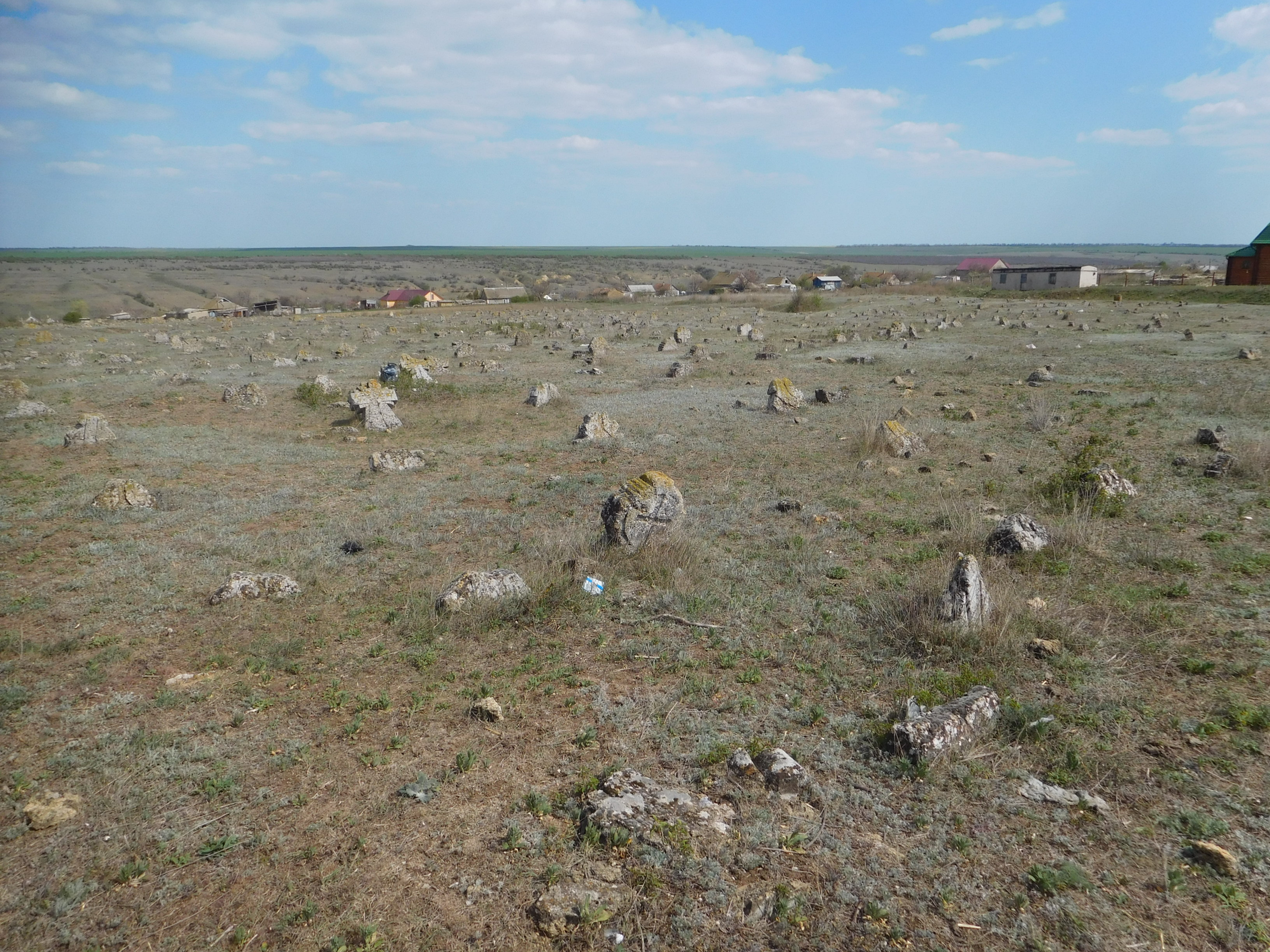 с. Кубанка, Лиманський район, Одеська область